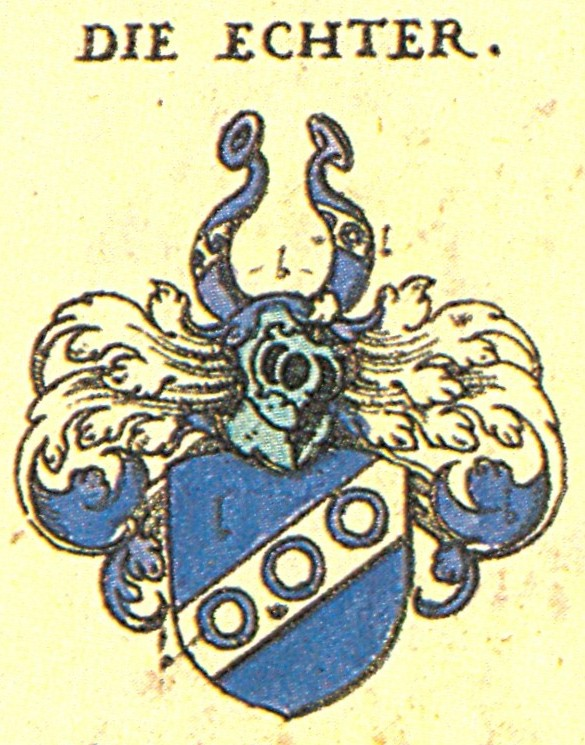 Ritterschaft und Adel in Franken Die Echter